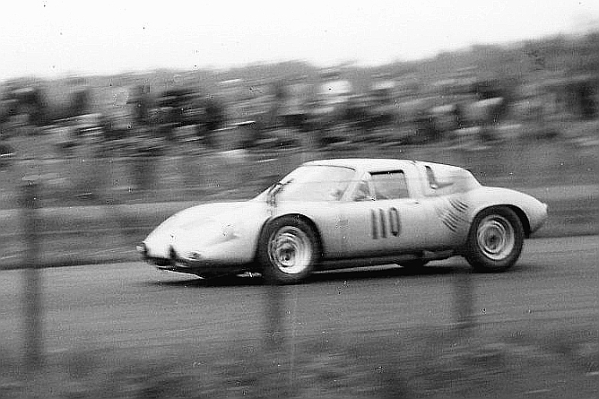 1000-km-Rennen auf dem Nürburgring 1962. Porsche 718 GTR von Gurney/Bonnier am Ende der Zielgeraden. Eigenes Foto, von altem Papierbild gescannt